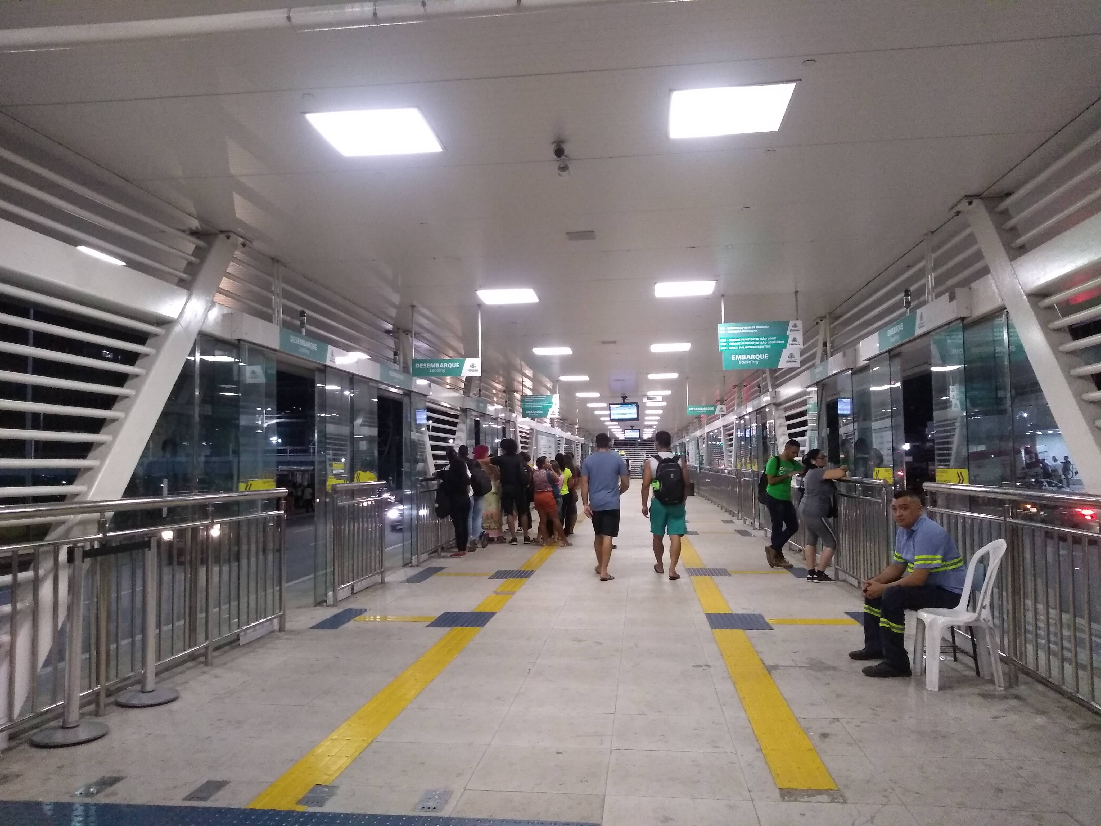 Sistema de BRT Expresso Fortaleza localizado na avenida Aguanambi na cidade de Fortaleza, Ceará, Brasil.